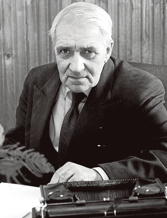 Gunnar Björling var den uthållige modernisten som med blid envishet utlade sin lära och sin dikt också i hundratals brev och i långa samtal i sin legendariska bostad i en f.d. bastu i Brunnsparken i Helsingfors.